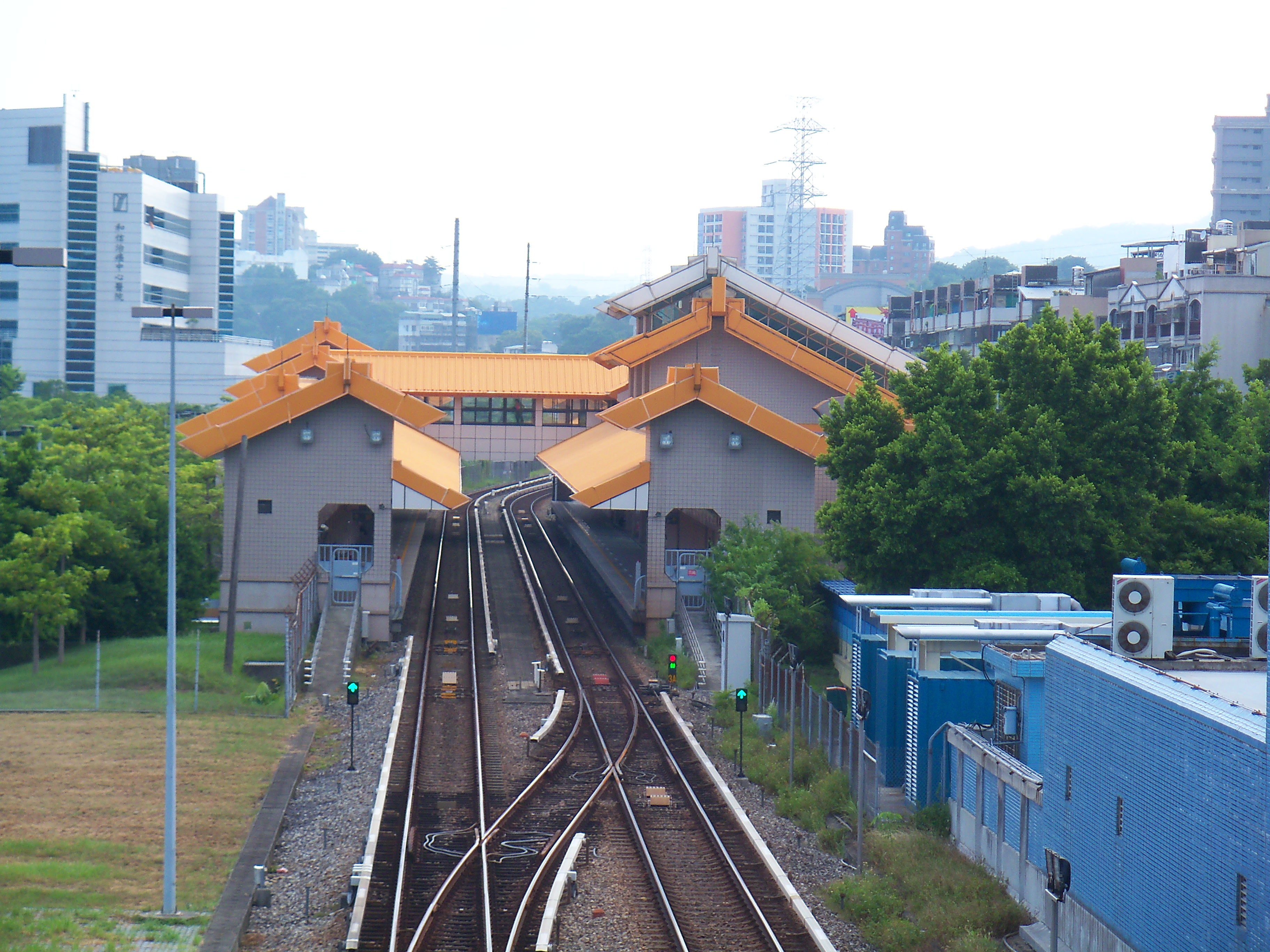 台北捷運淡水線忠義駅構内。